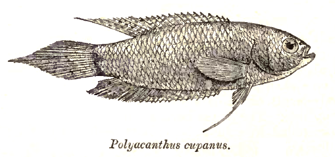 Polyacanthus cupanus = Pseudosphromenus cupanus (Cuvier, 1831)